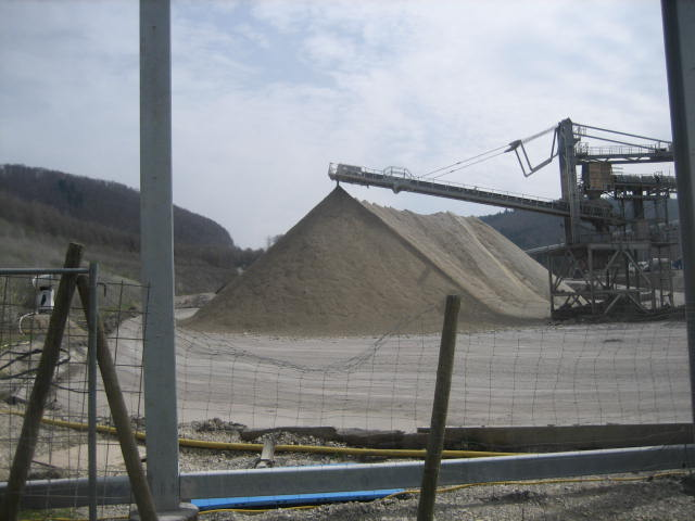 Boßlertunnel Abraumhalde Aichelberg